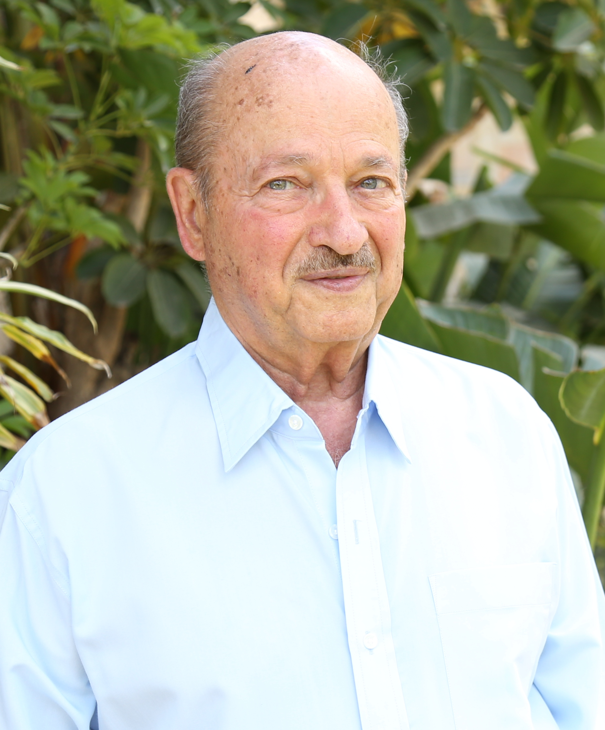 ישראל אליעזרי